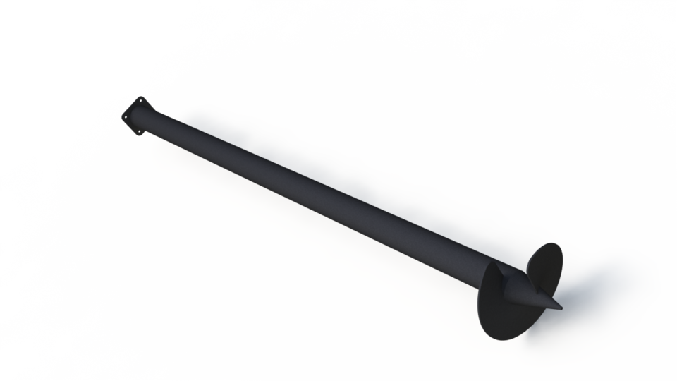 Гвинитова паля